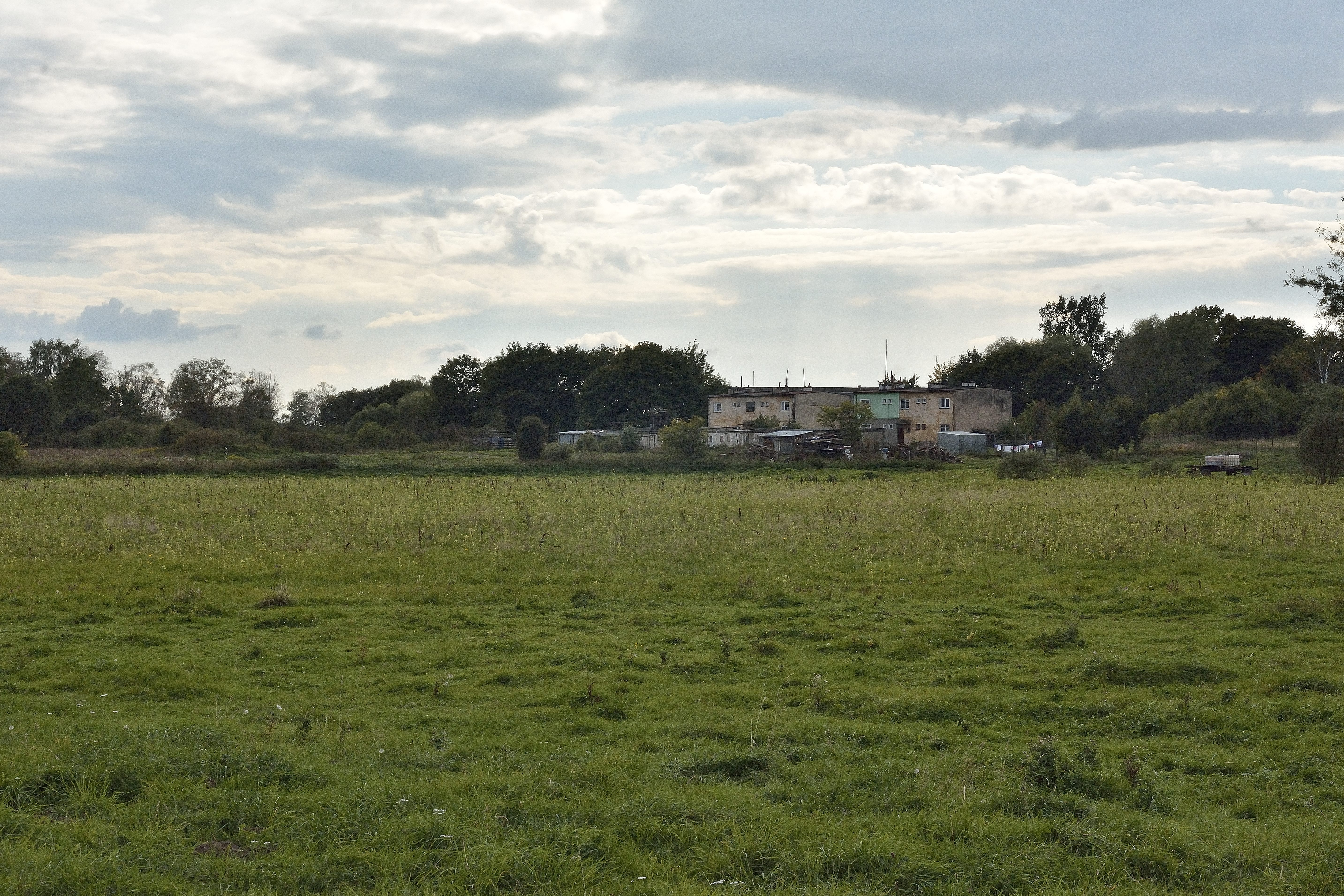 Bloki mieszkalne w b. PGR Grabnik Mały